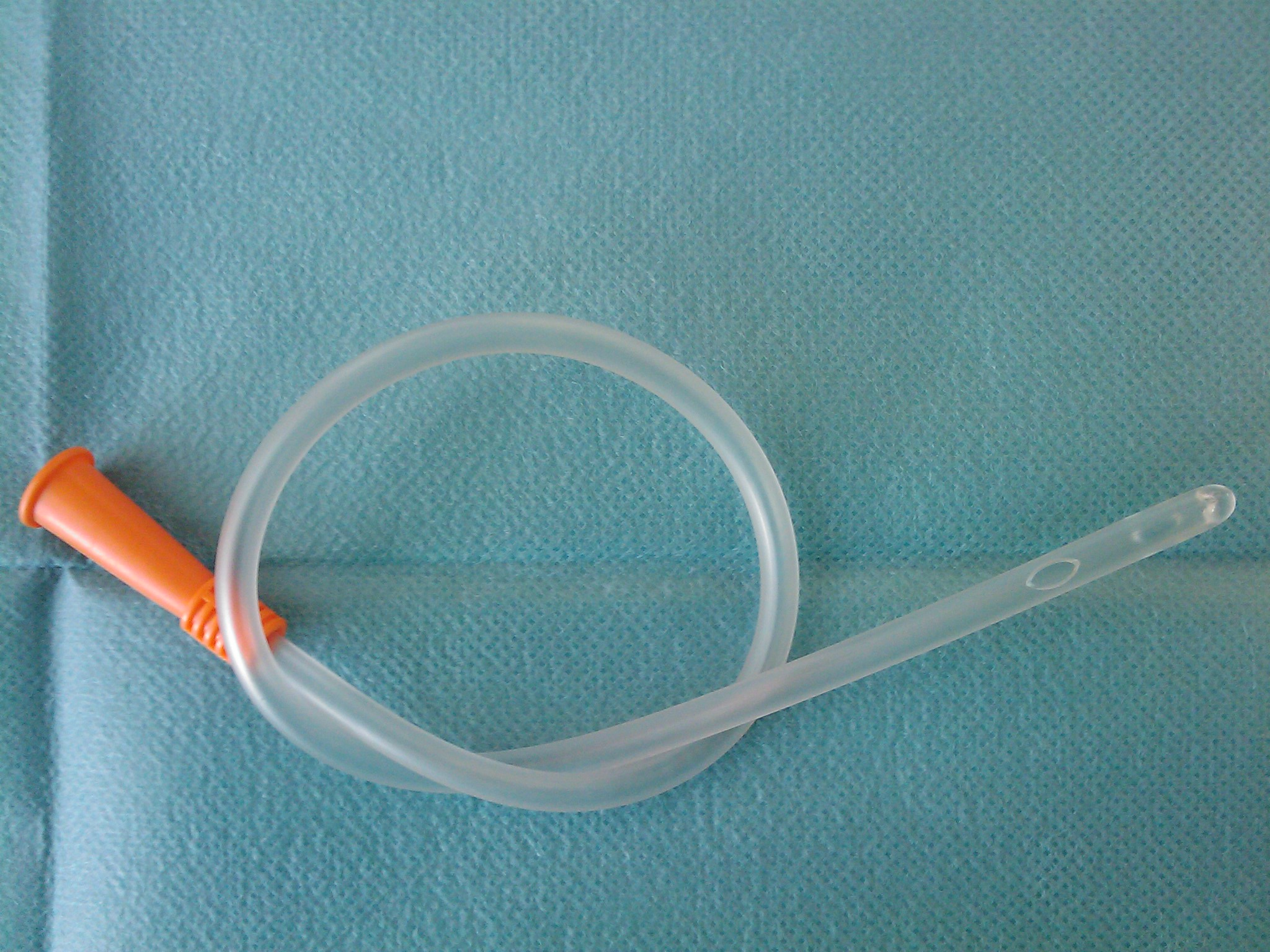 Qadın üçün birdəfəlik sidiklik kateteri